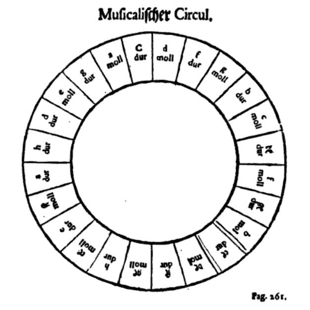 Johann David Heinichen's musical circle (German: musicalischer circul) from Neu erfundene und gründliche Anweisung (1711), p. 261.